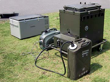 [炊飯能力] 最大50人分の主食及び副食が同時に概ね45分以内に調理できる。 [調理の種類] 炊飯、汁、焼・煮・炒・揚げ物等の調理が可能 [構成] かまど及び釜,調理台,冷凍冷蔵庫,貯水タンク,給排水装置,発電機 現用の野外炊具の損耗更新用。自動点火・消火機構並びに安全機構として不着火防止及び立ち消え防止機構を有する。12年度から冷凍冷蔵機能、貯水機能、給排水機能及び自動着火機能が追加され、操用性を増している。